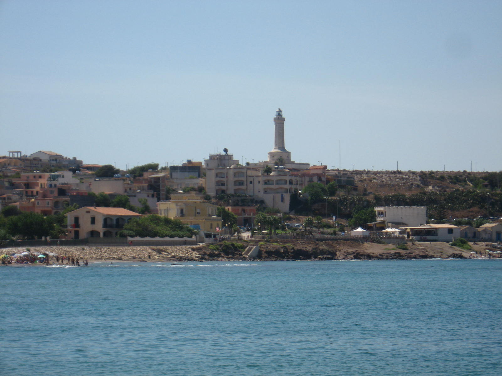 Foto del faro di Capo Passero